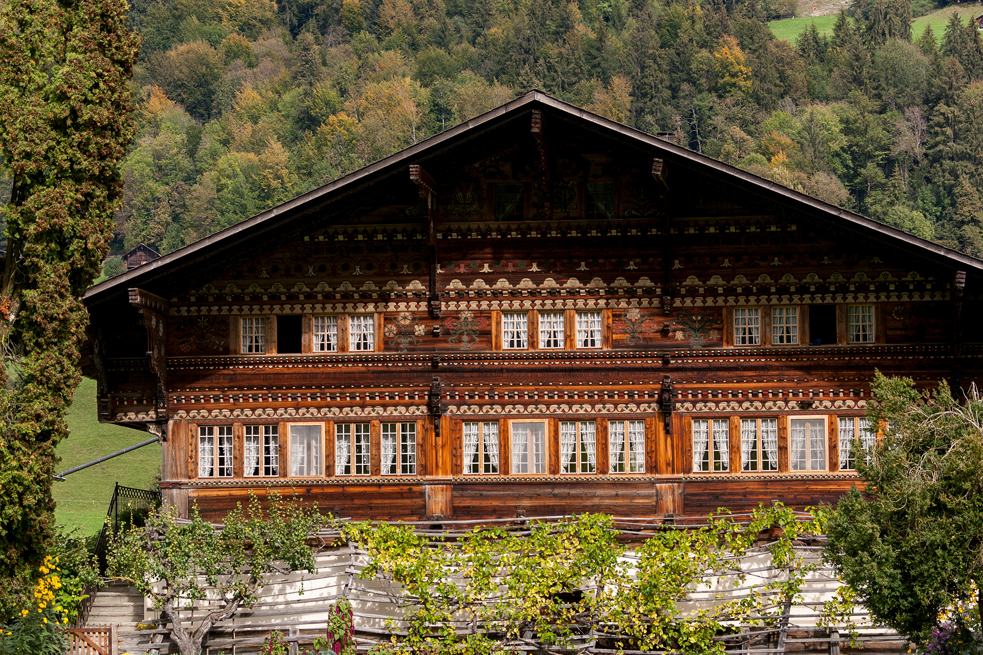 Simmentaler Bauernhaus "Knutti" in Därstetten (BE)